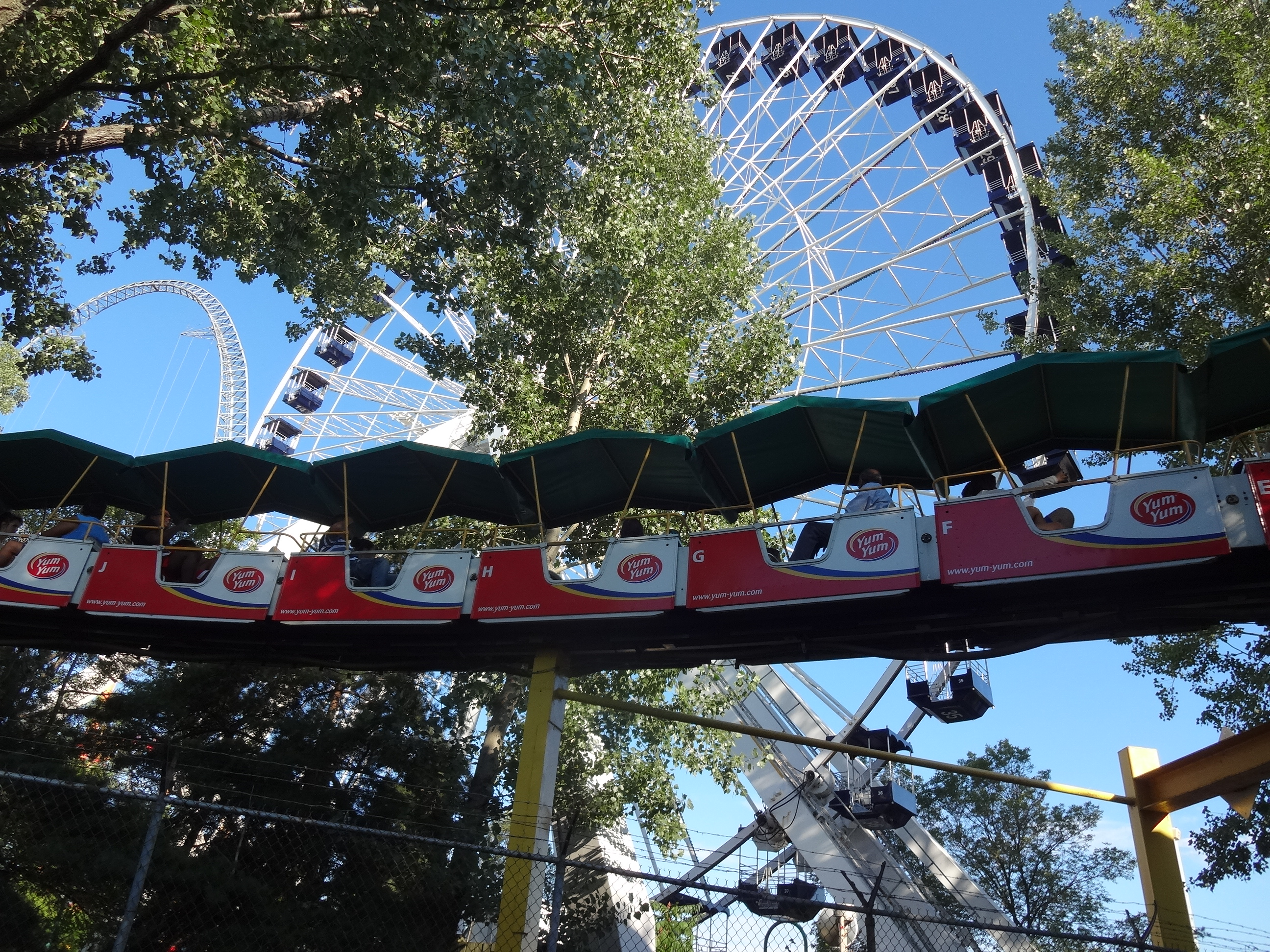 Trilho na ilha Santa Helena, em Montreal.